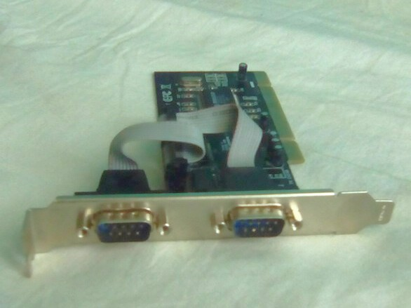 Tarjeta PCI para ordenador de sobremesa. Contiene dos puertos serie RS-232.